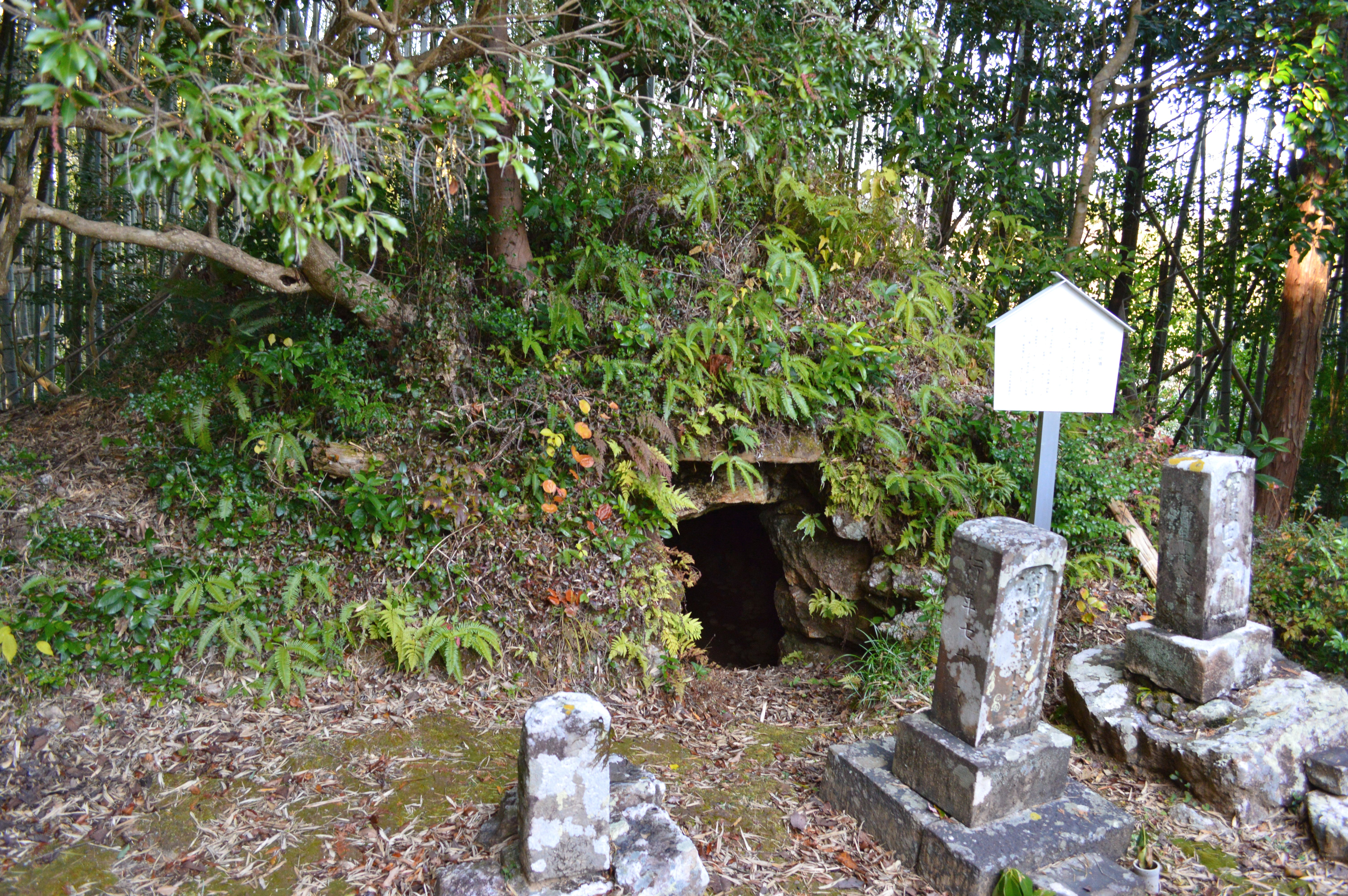 明見彦山3号墳 概観